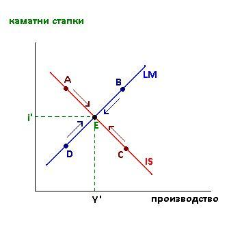 Состојба на еквилибриум (рамнотежа) на пазарот на пари и на пазарот на стоки